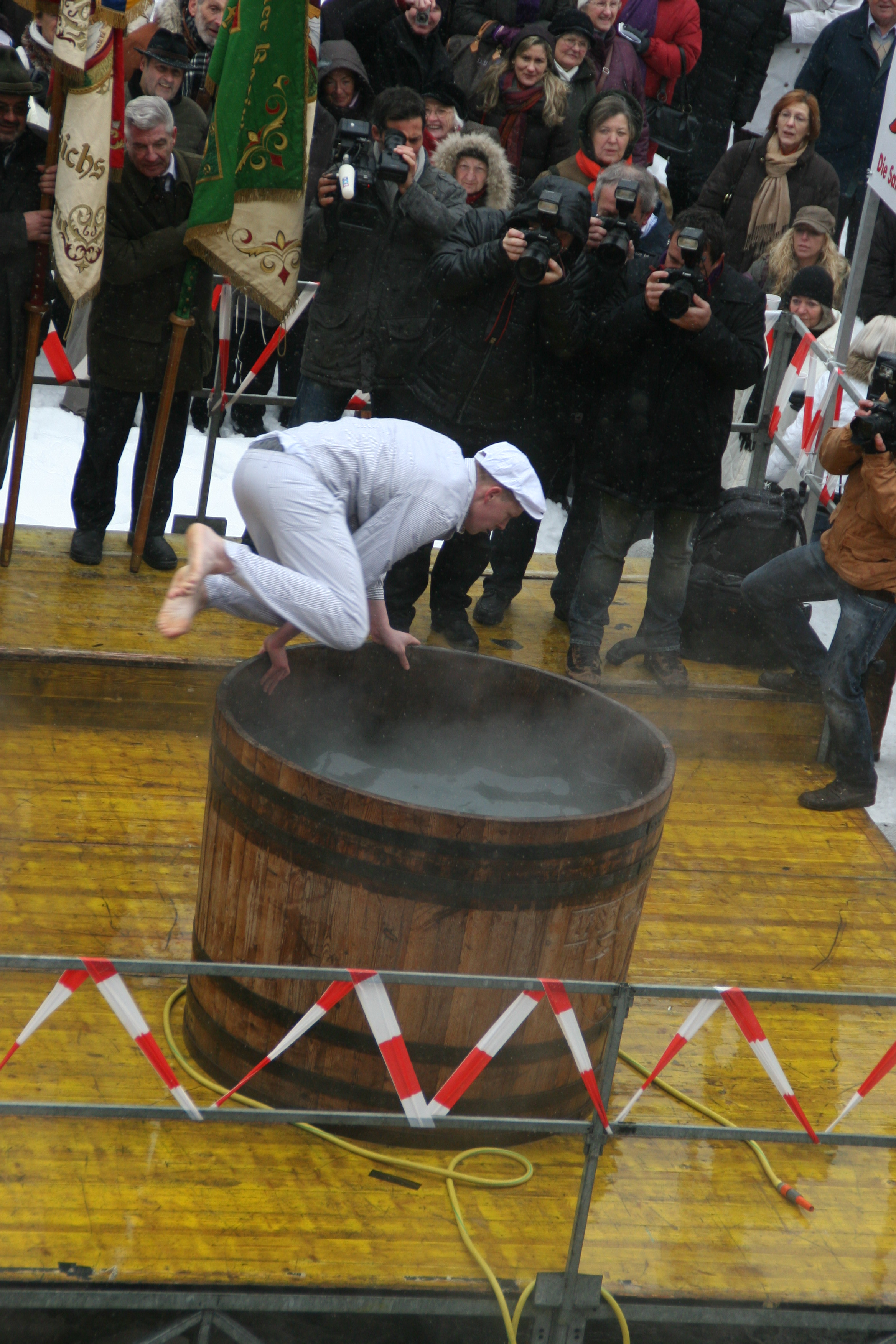 Metzgersprung Salzburg aufgenommen am 14. Februar 2010